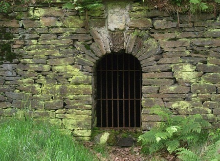 Mundloch "Alter Tiefer Fürstenstolln"